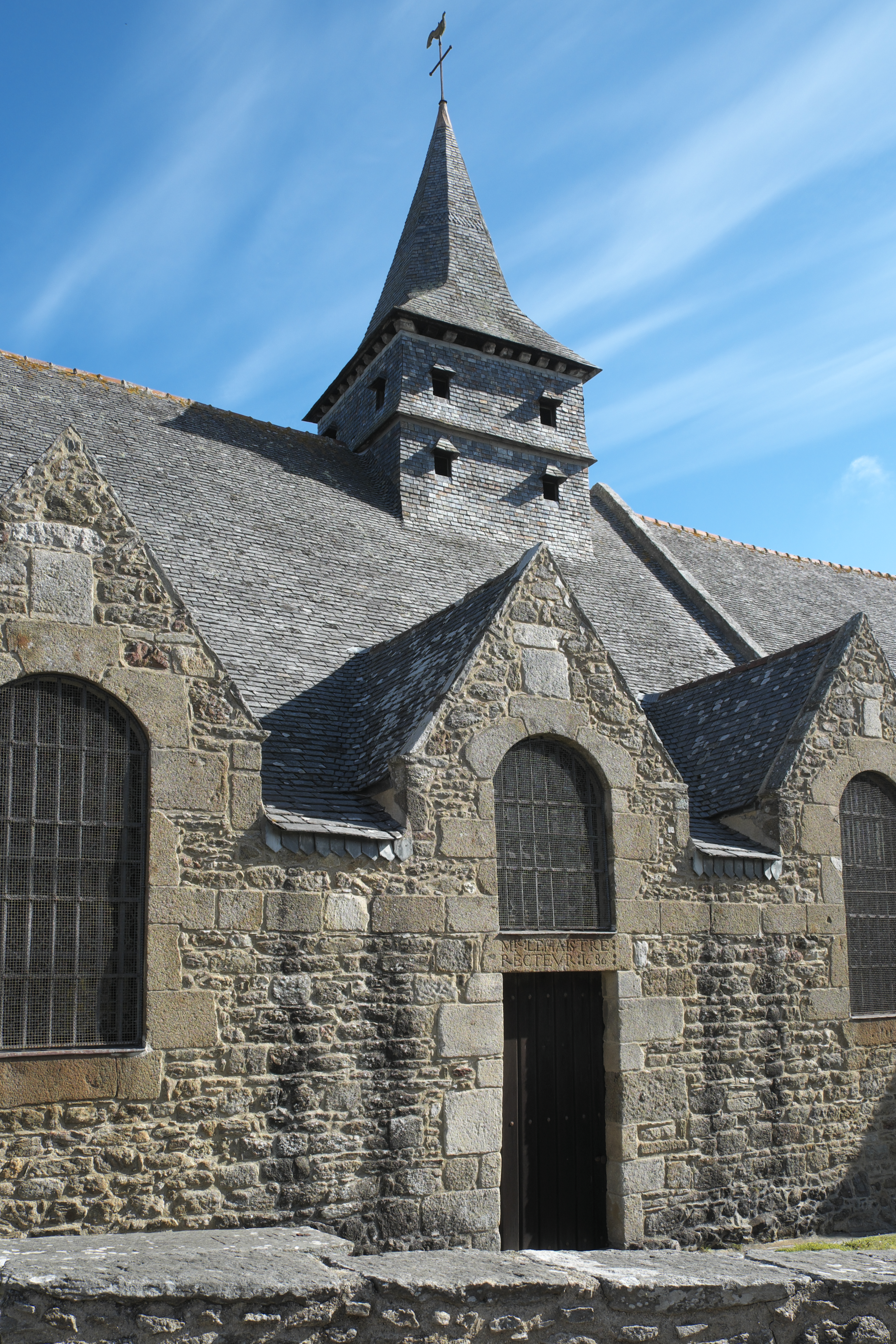 Alte Katholische Pfarrkirche Saint-Lunaire in Saint-Lunaire im Département Ille-et-Vilaine (Region Bretagne/Frankreich), Portal und Glockenturm